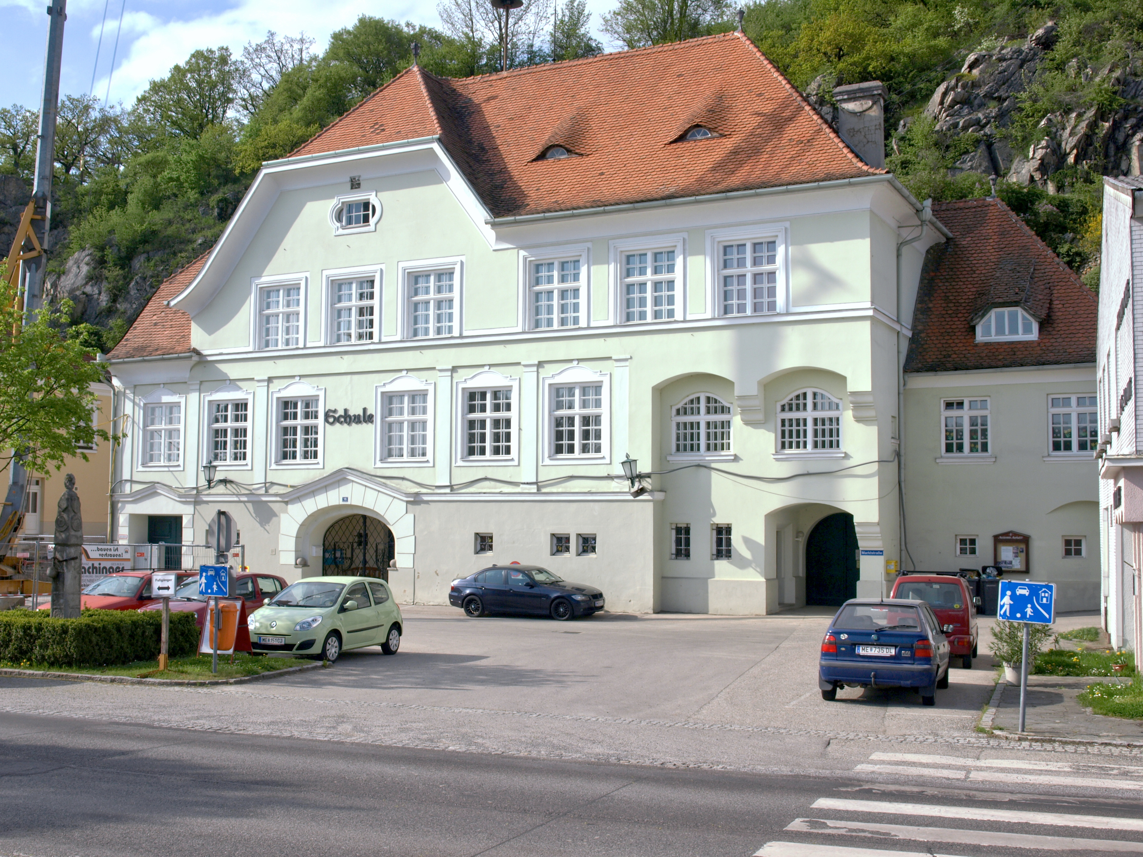 Volksschule